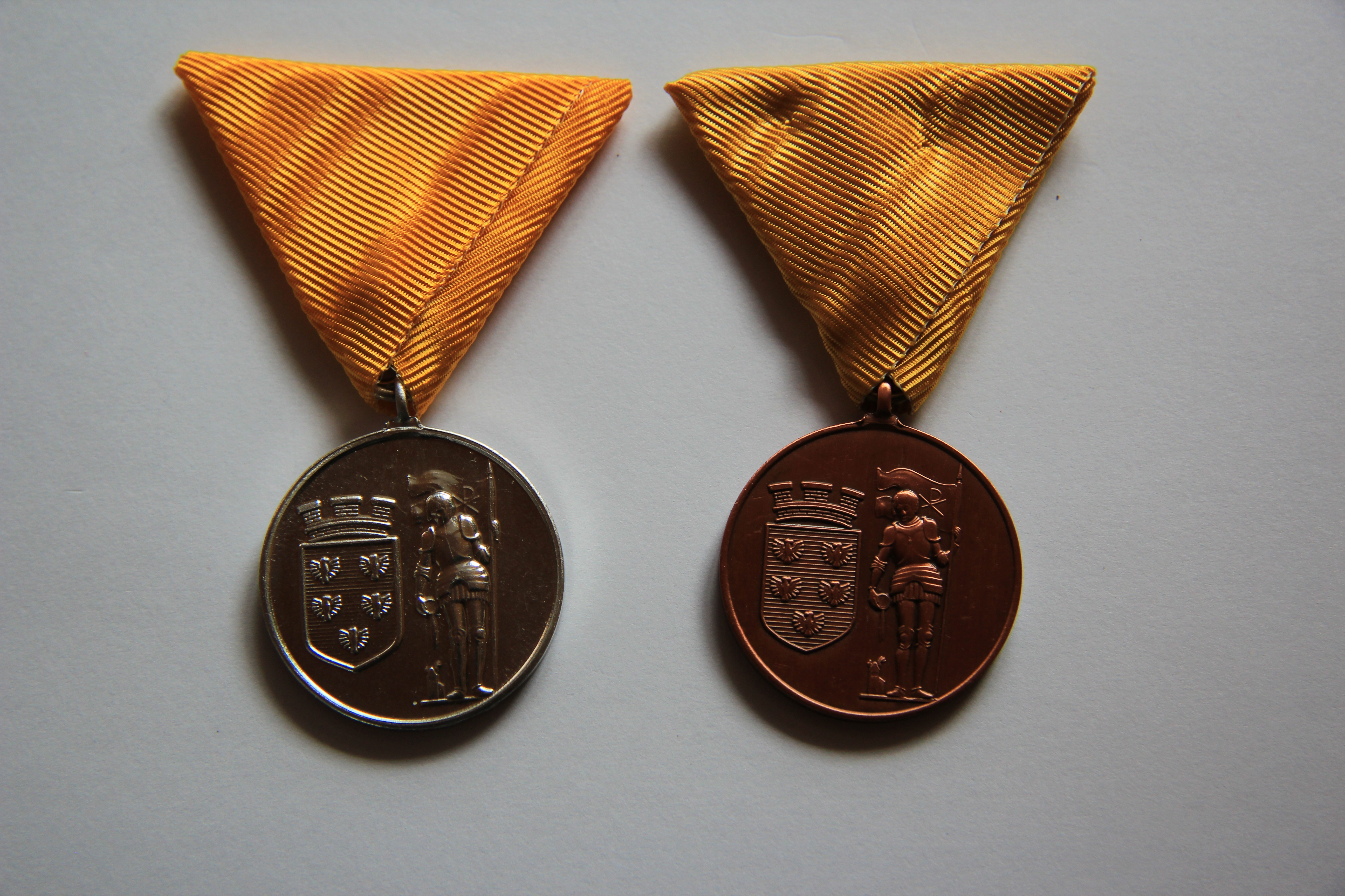 Ehrenzeichen für vieljährige Verdienste auf dem Gebiete des Feuerwehr- und Rettungswesens für 25 Jahre, Vorderseite